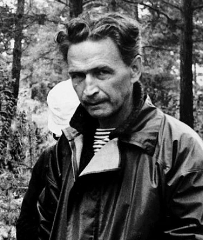 Kjell Abramson i samband med planeringen för Ingmar Bergmans hus på Fårö